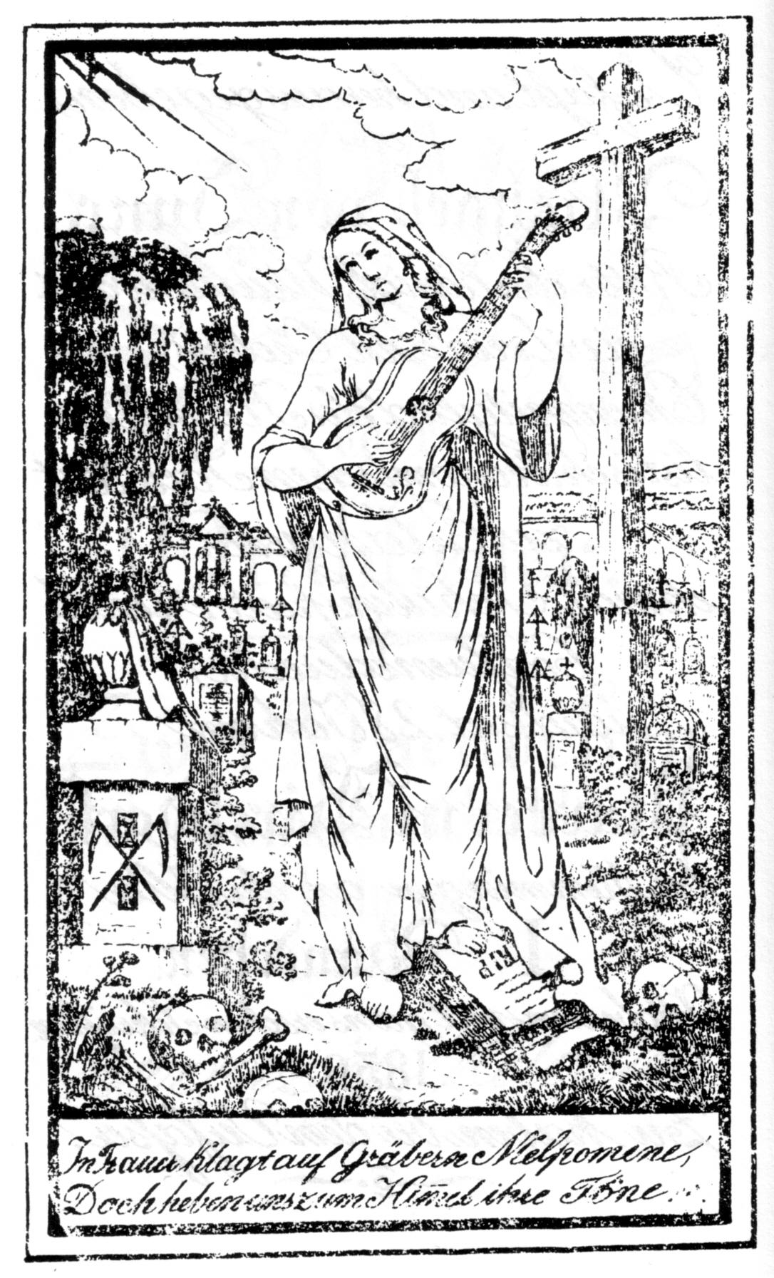 de: Michael von Jung: Melpomene oder Grablieder. Zwei Baendchen jedes hundert Grablieder enthaltend mit zwanzig Melodien.